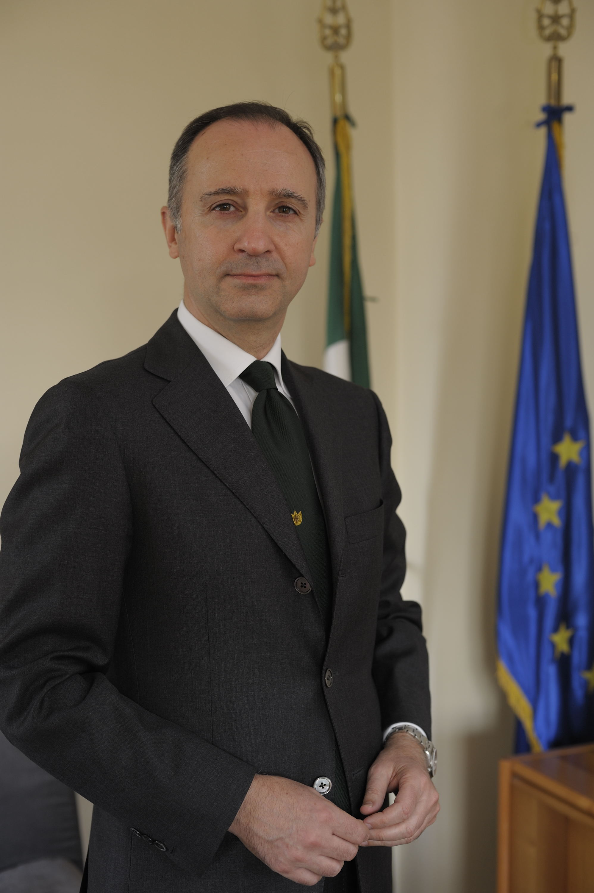 ambasciatore Varricchio